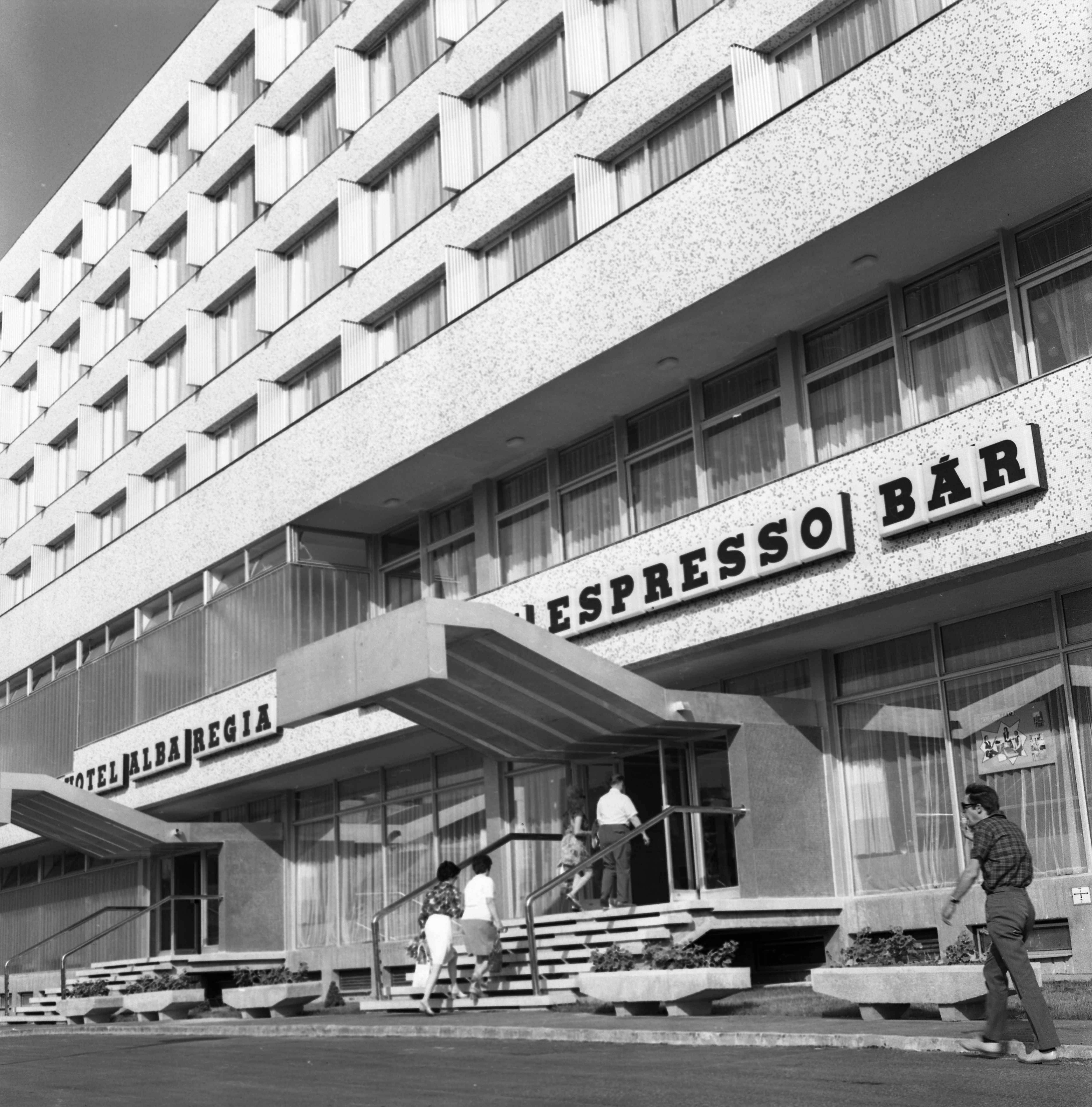 Hotel Alba Regia. Location: Hungary, Székesfehérvár Tags: hotel Title: Hotel Alba Regia.